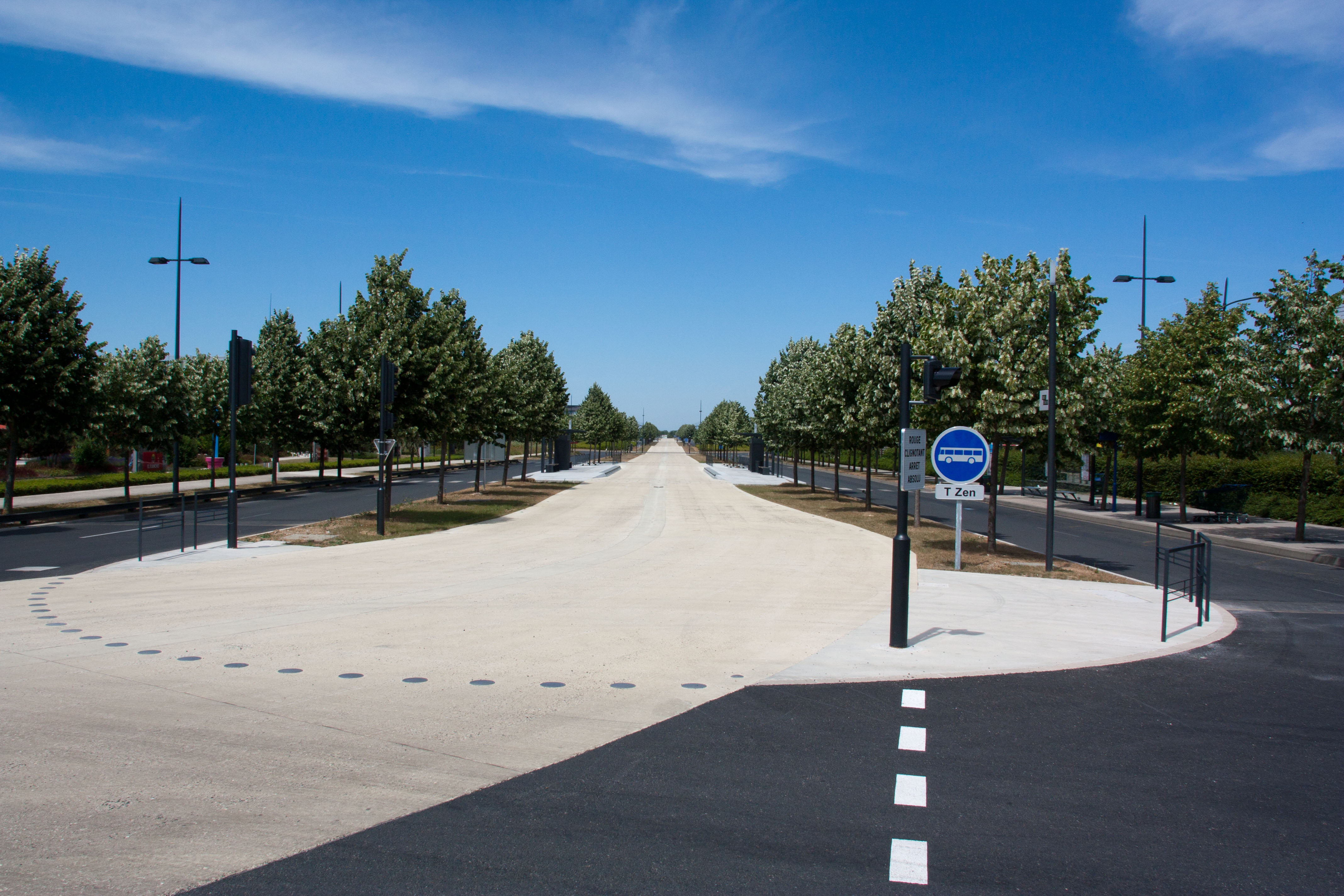 T-ZEN Ligne 1 - station de la ligne - Département de l'Essonne et de Seine-et-Marne